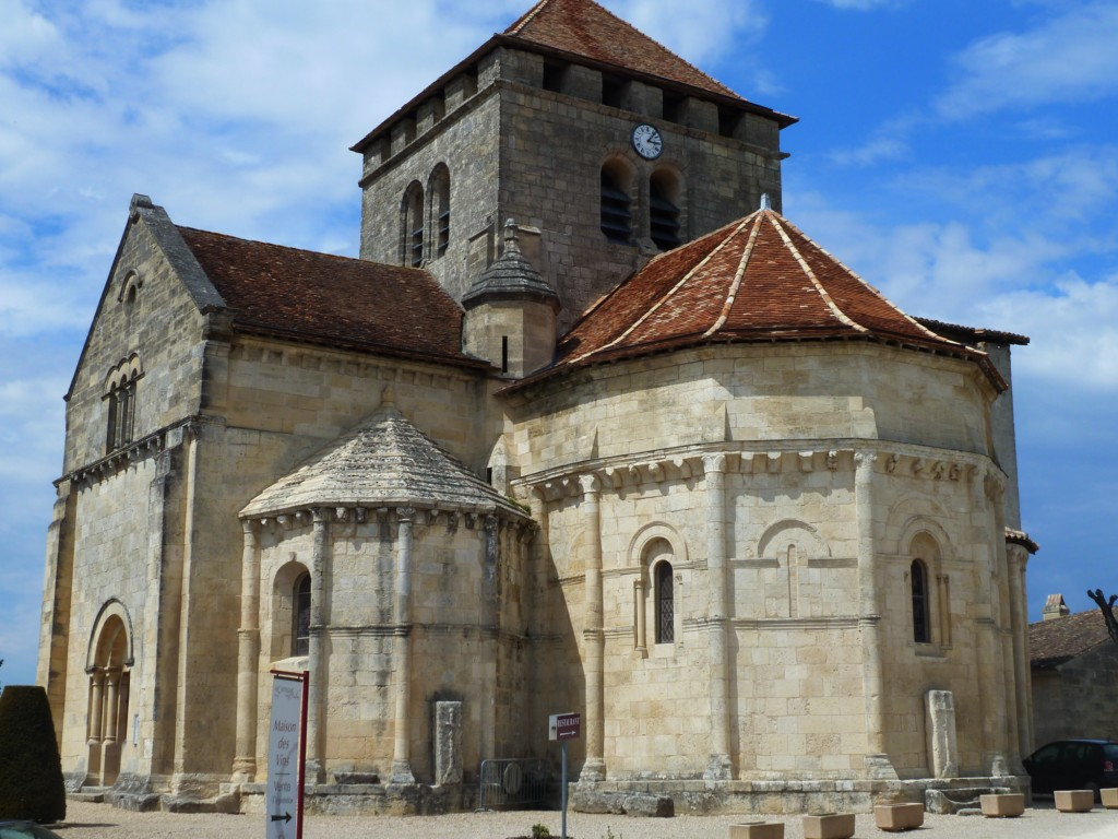 Eglise de Montagne (gironde)